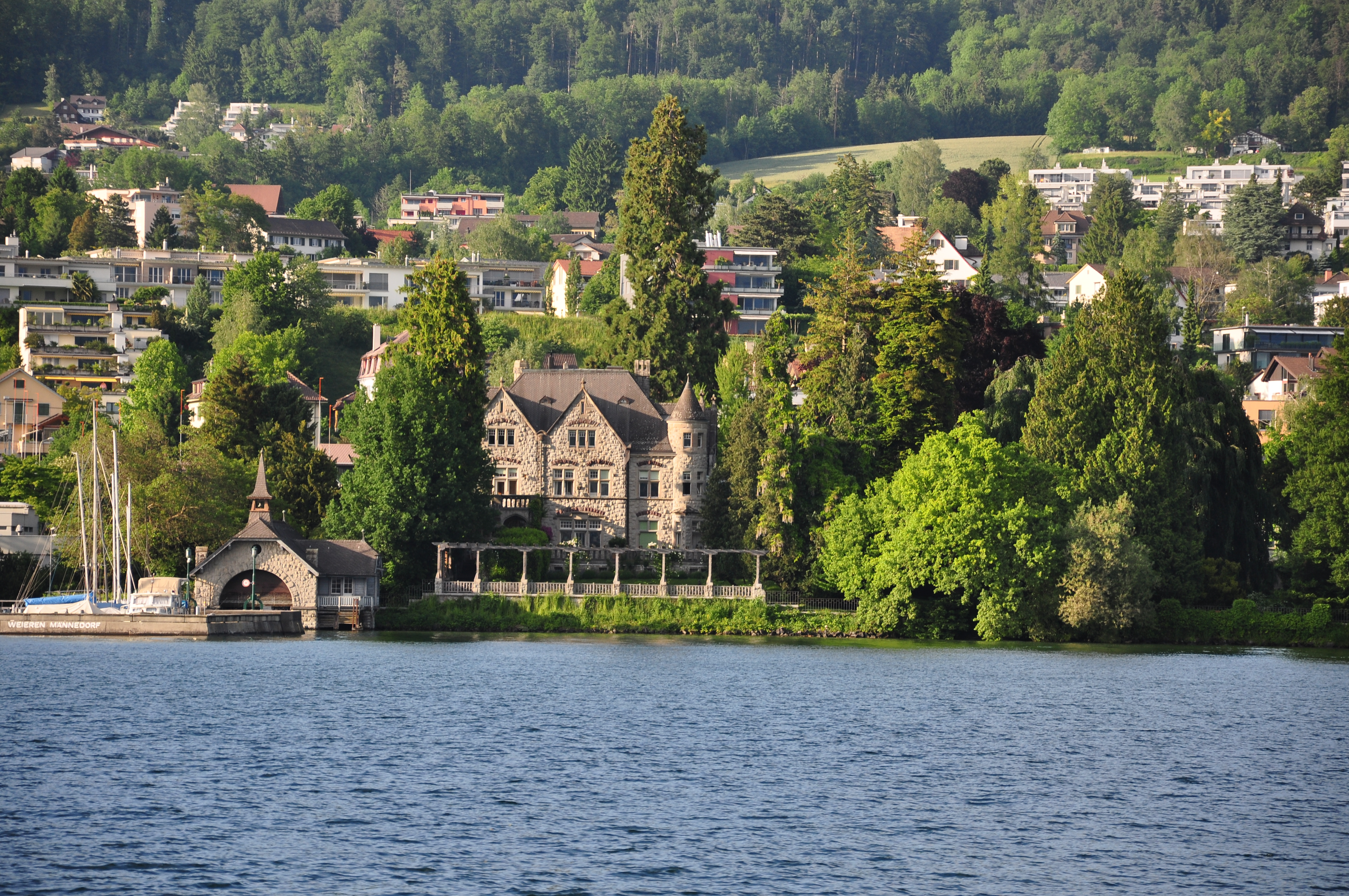 Villa Alma, Männedorf (Switzerland) as seen from ZSG paddle steamship Stadt Zürich